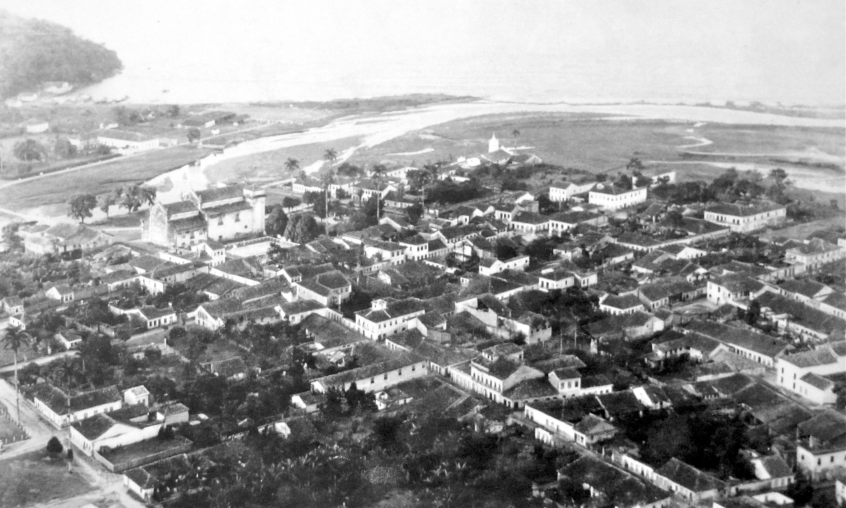 Vista aérea de Paraty, c. 1950